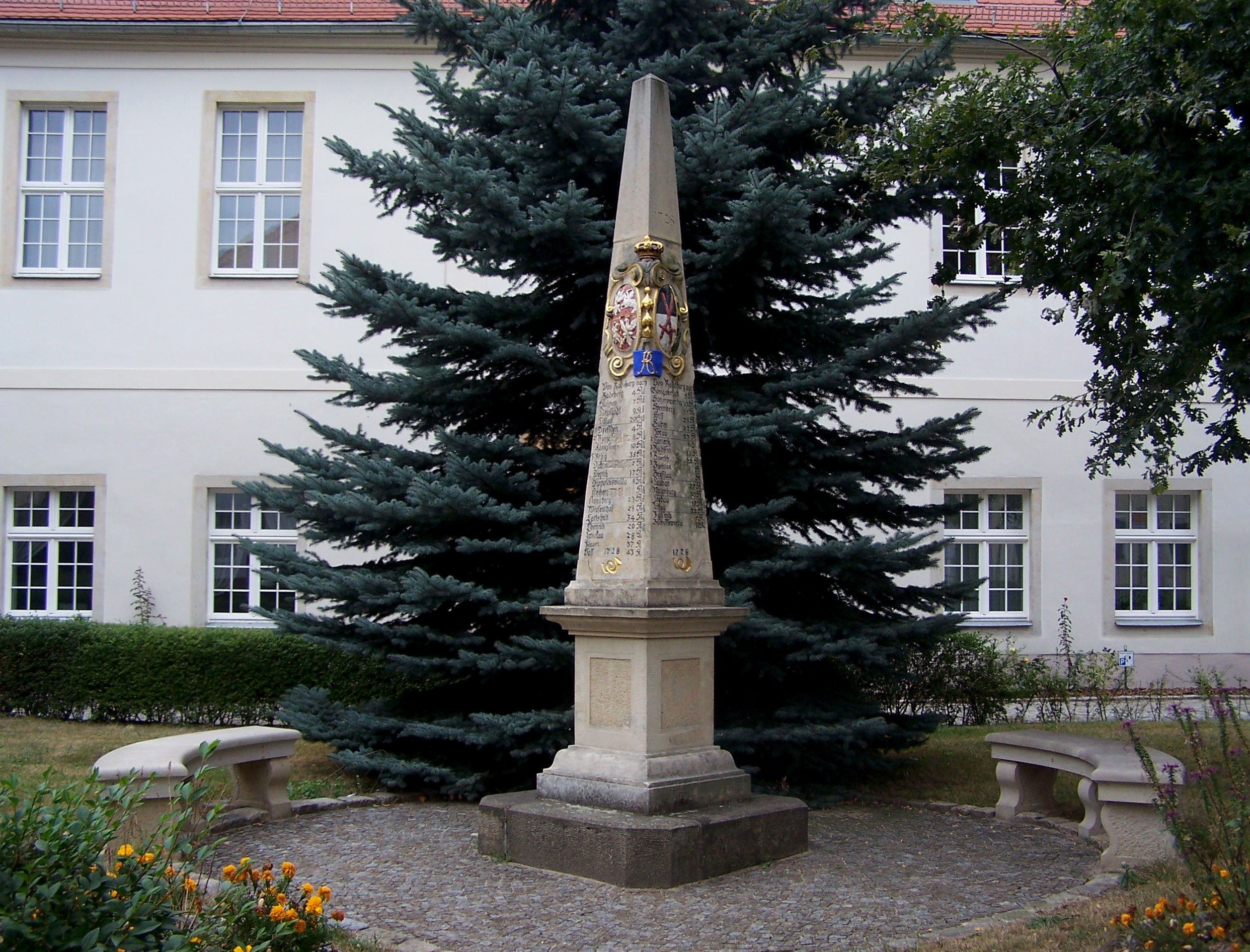 Frontansicht